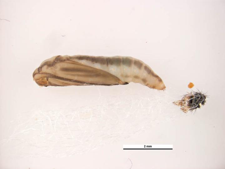 Plutella xylostella pupa, lateral view